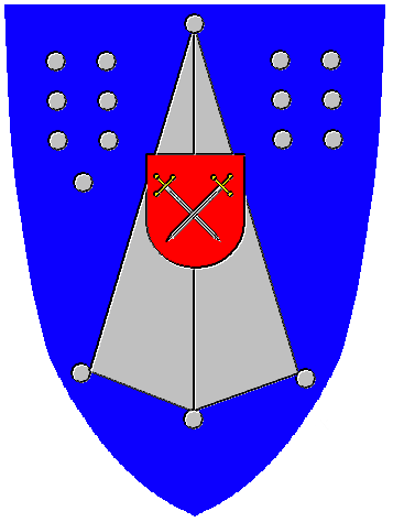 Stema „Scaunului Orăștiei” (în germană Brooser Stuhl sau Stuhl Broos), unitate administrativă a sașilor transilvăneni înființată în secolul al XII-lea.